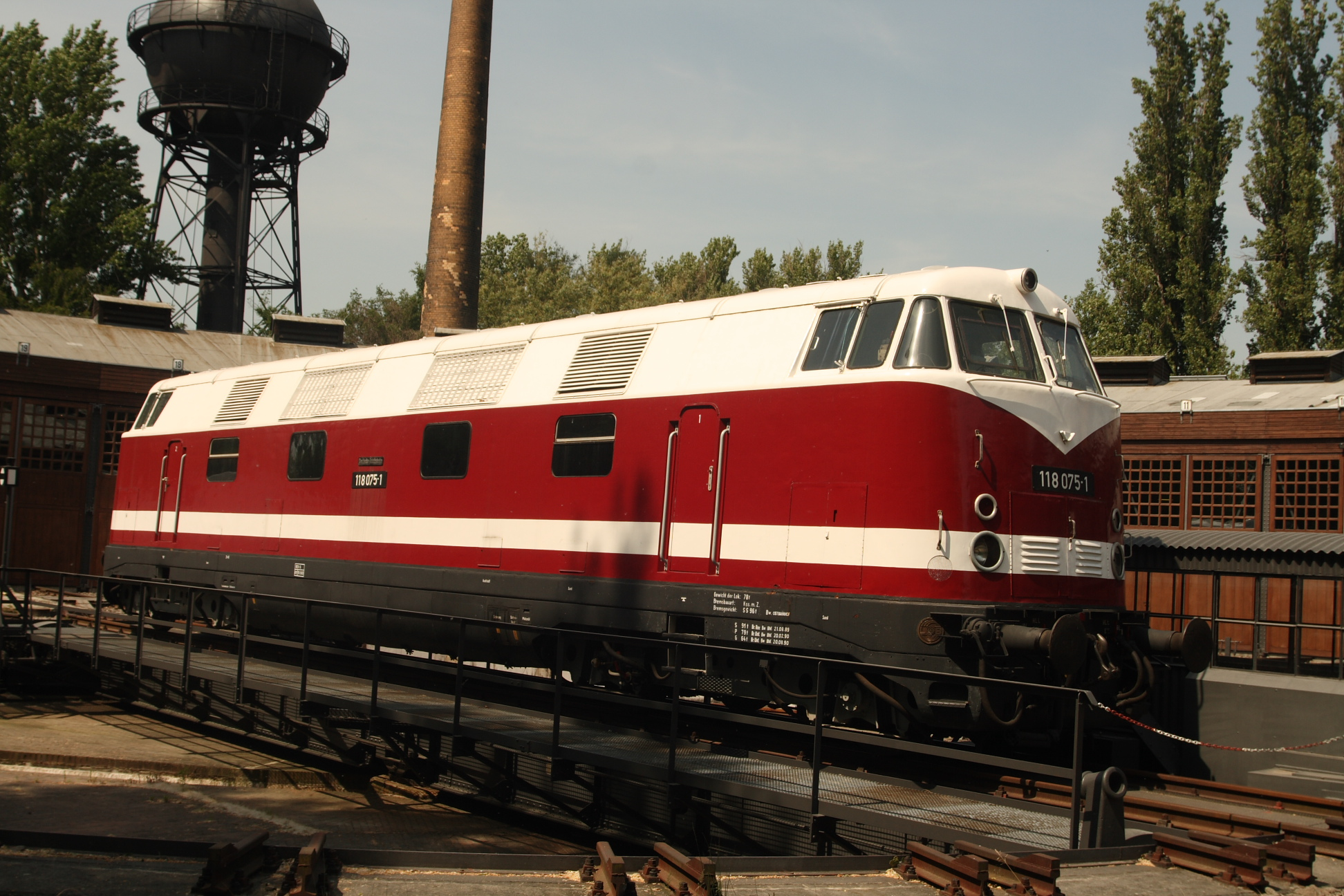 DR-Baureihe V 180 im Technikmuseum Berlin